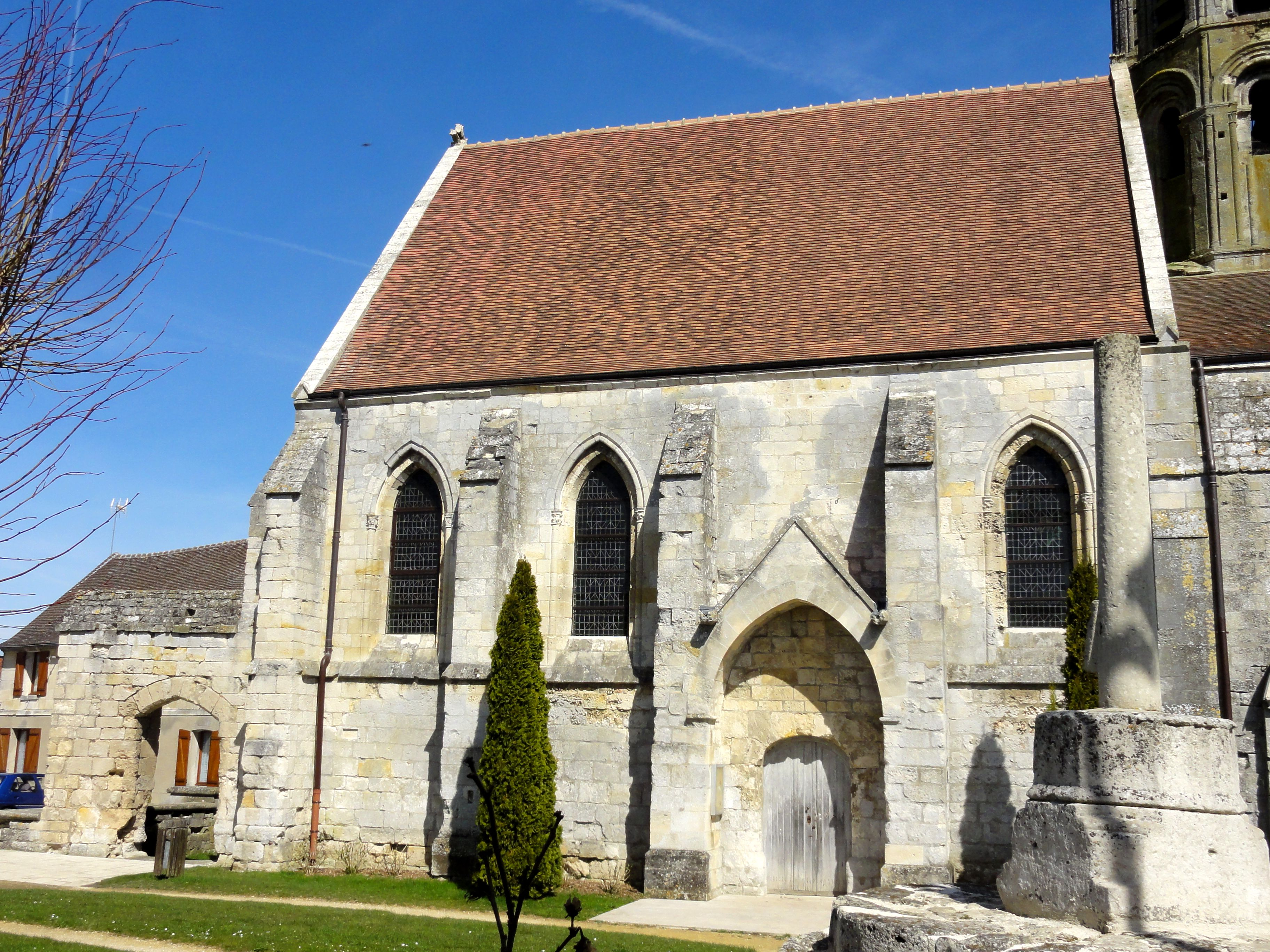 La nef, vue depuis le sud.